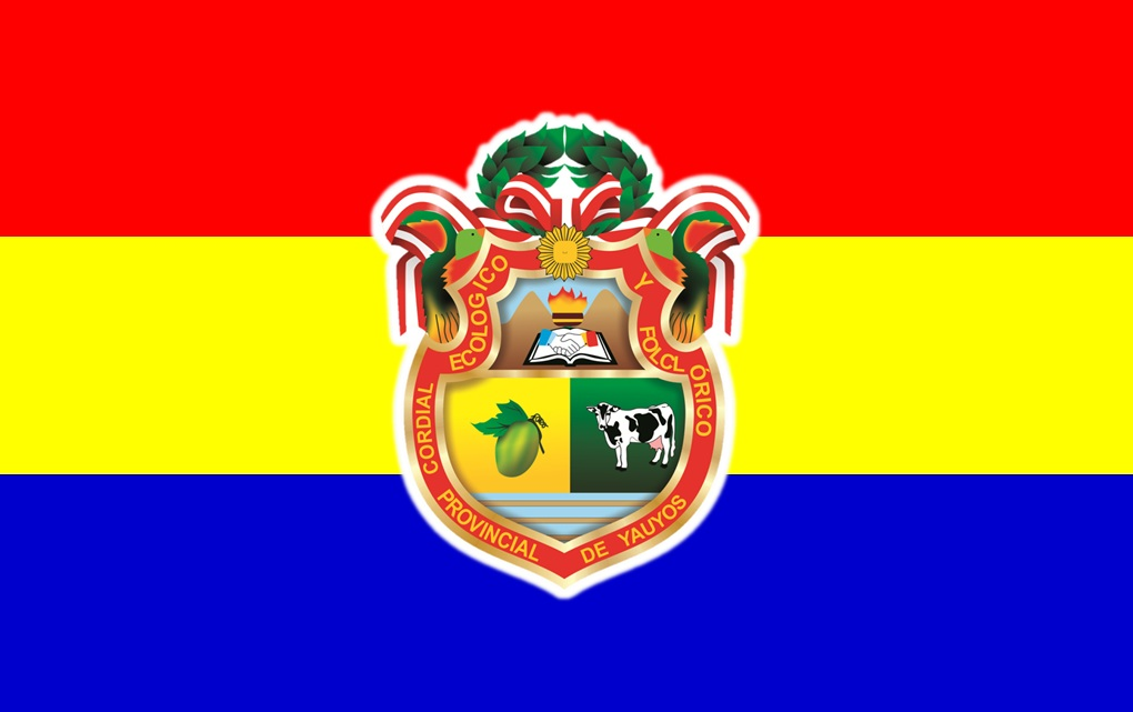 Bandera de la Provincia de Yauyos